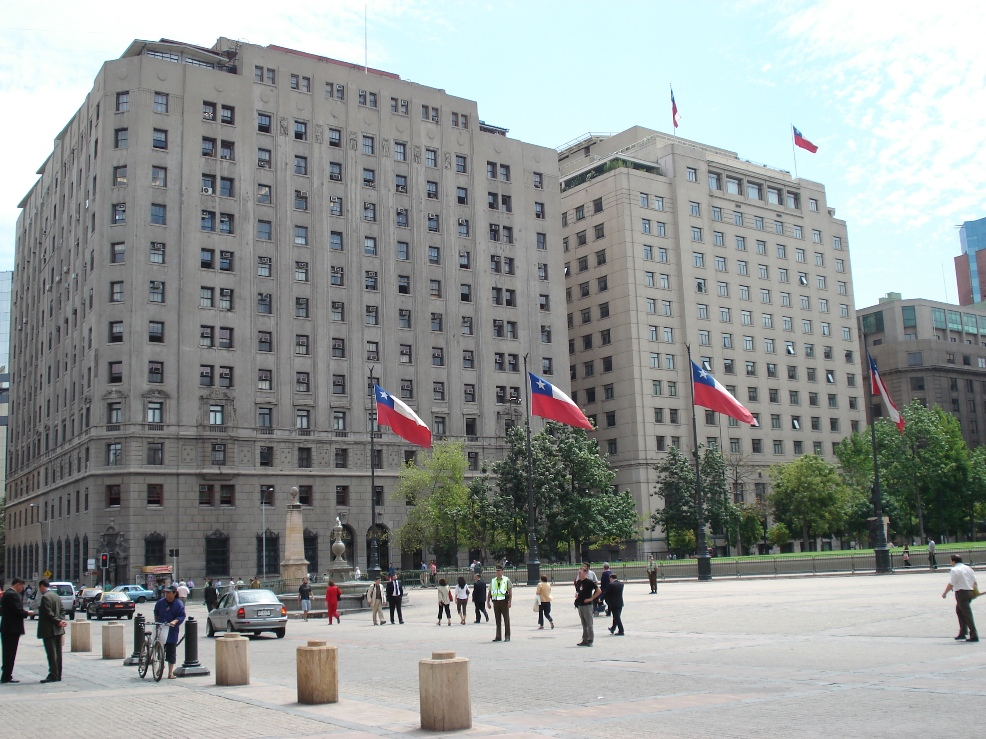 Edificio de los ministerios de Hacienda y Relaciones Exteriores de Chile.